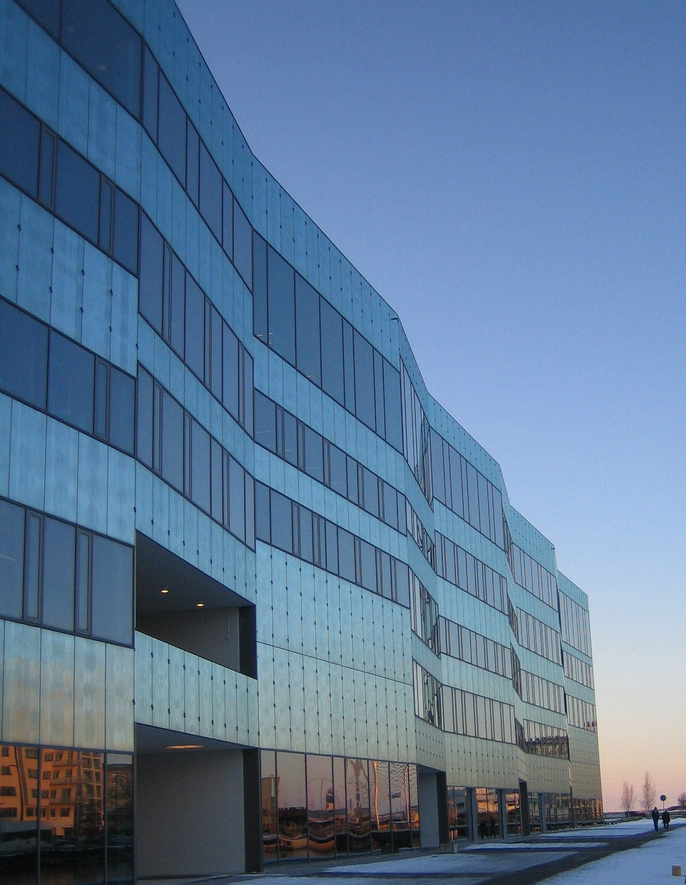 The Orkanen building of Malmö högskola.